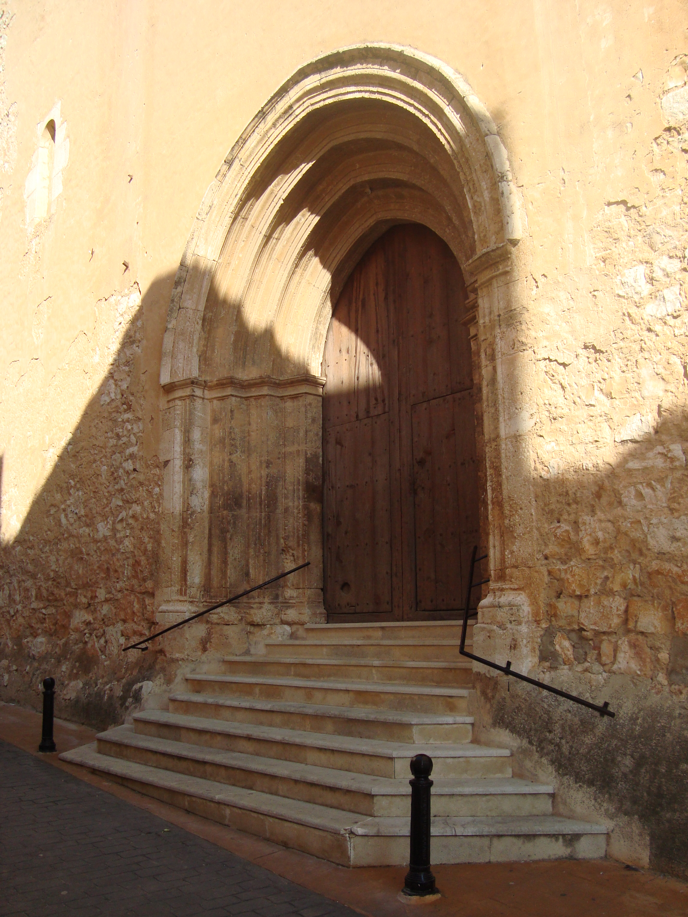 Església parroquial de Miquel Arcàngel (Canet lo Roig) 03.036-002.